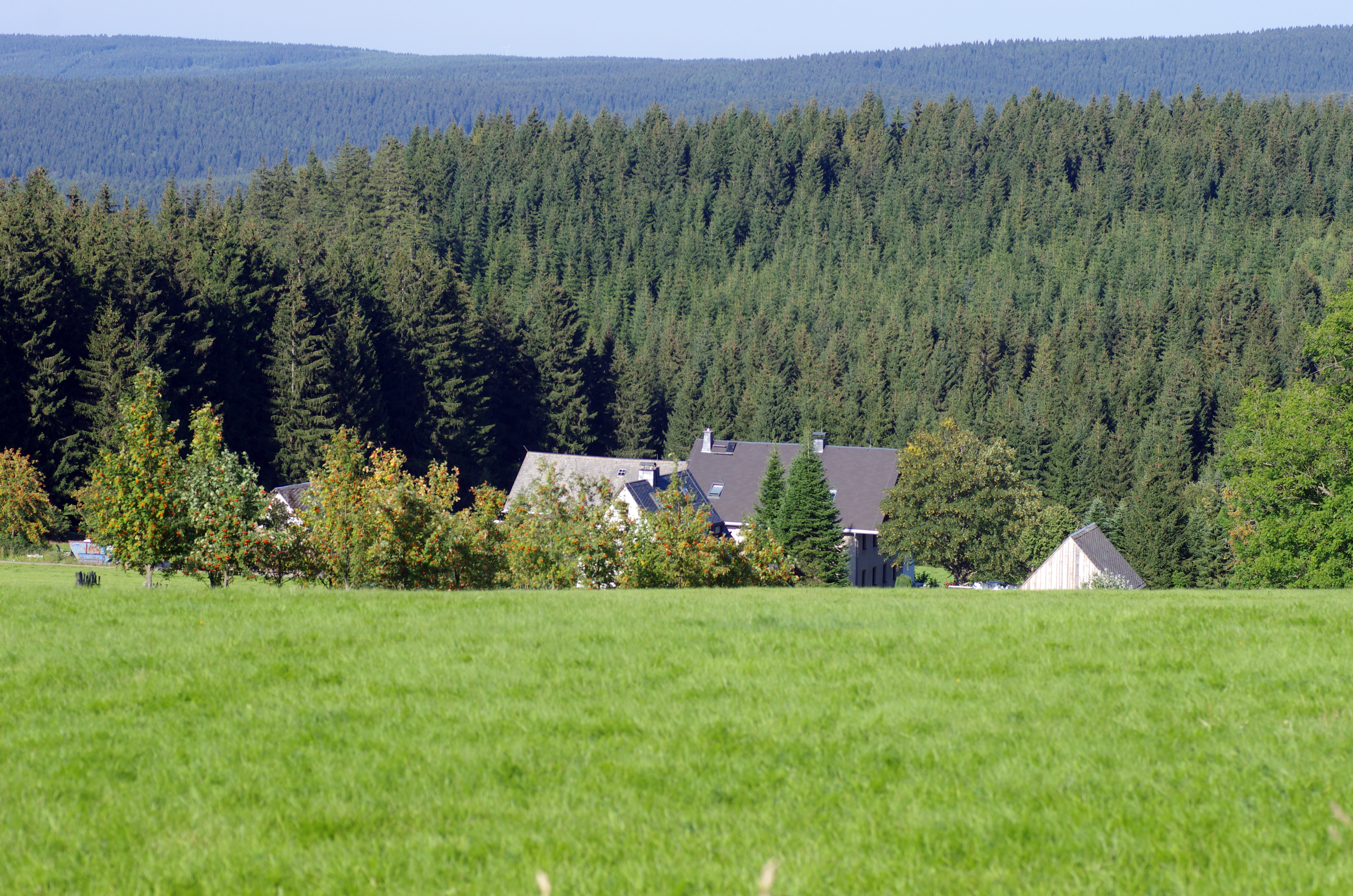 Pohled přes státní hranici od zaniklé osady Mílov v Krušných horách na německou osadu Halbmeile